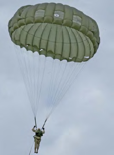 Ein Soldat mit dem steuerbaren Rundkappenfallschirm MC-6, der auch als FS-14 bei den Smokejumpern der USA eingeführt ist. Gut zu erkennen sind die drei hinteren Öffnungen für den Vorschub und die Steuerschlitze an der Seite.